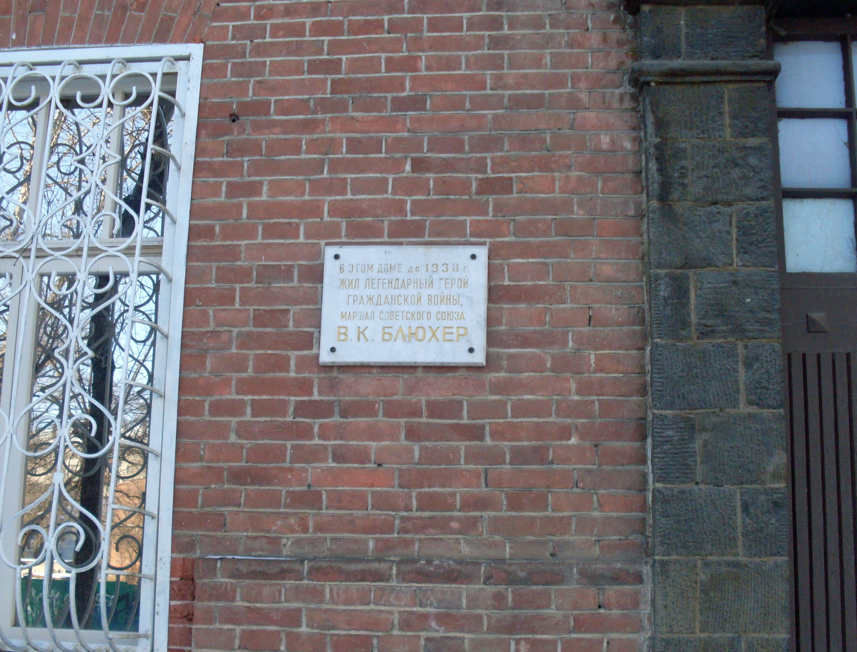 Мемориальная доска памяти В.К.Блюхера на здании по ул.Истомина в Хабаровске.